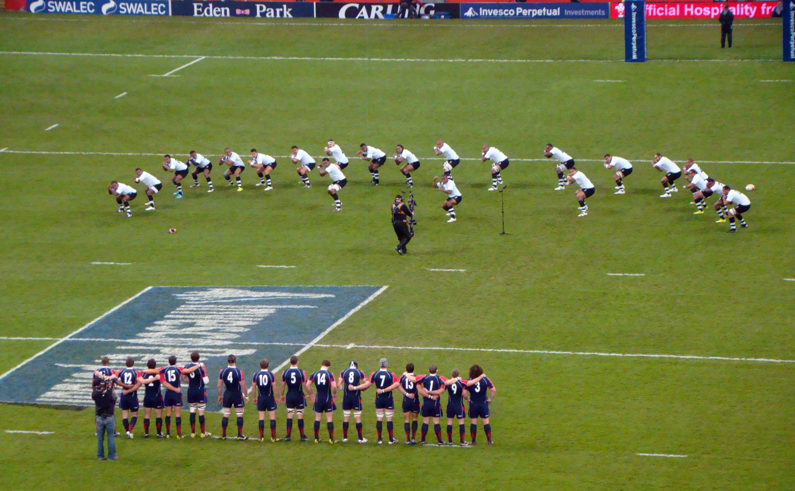 19/11/10 Wales v Fiji, Millennium Stadium, Cardiff, Wales